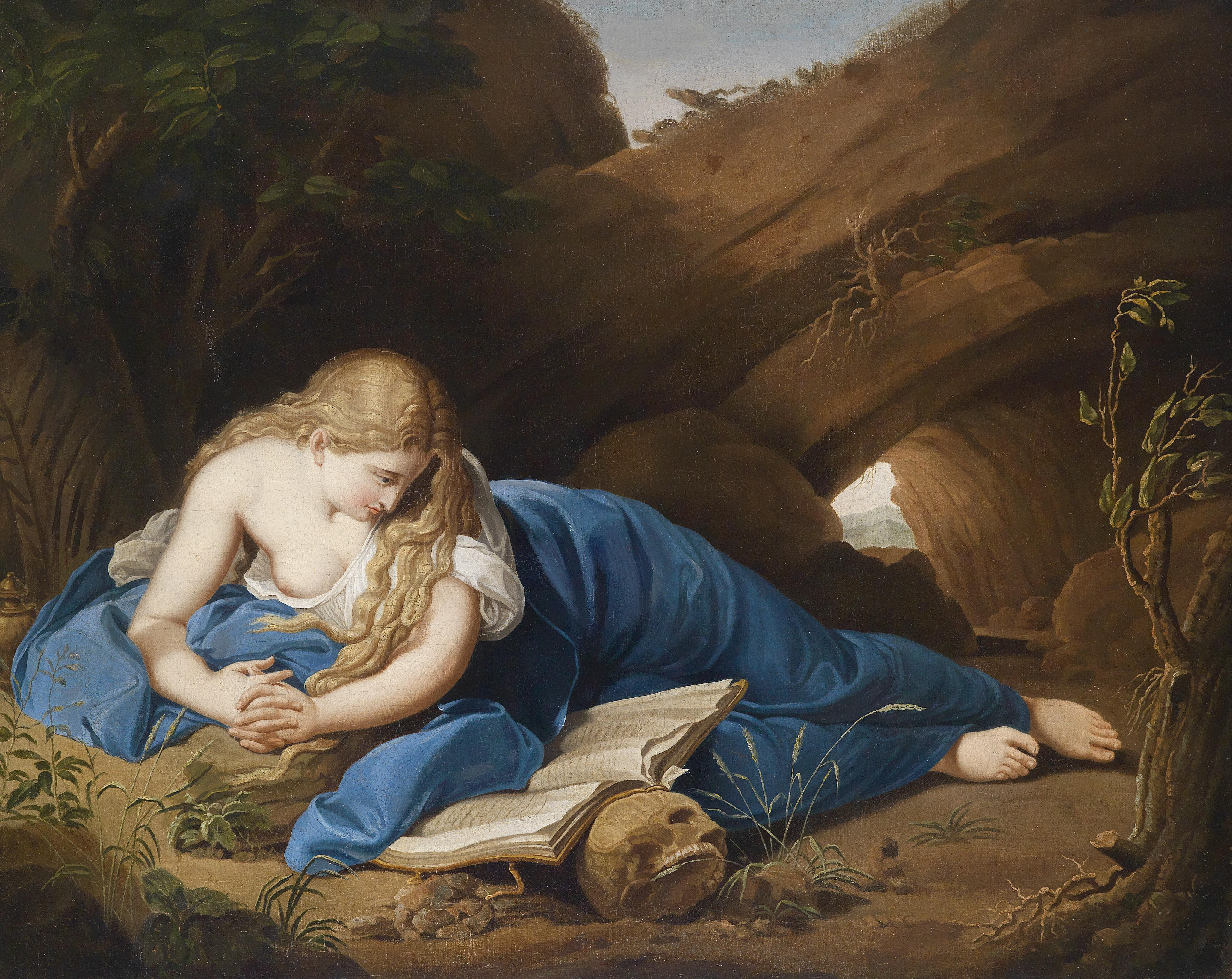 Die büßende Magdalena, Öl auf Leinwand, 77 x 95 cm